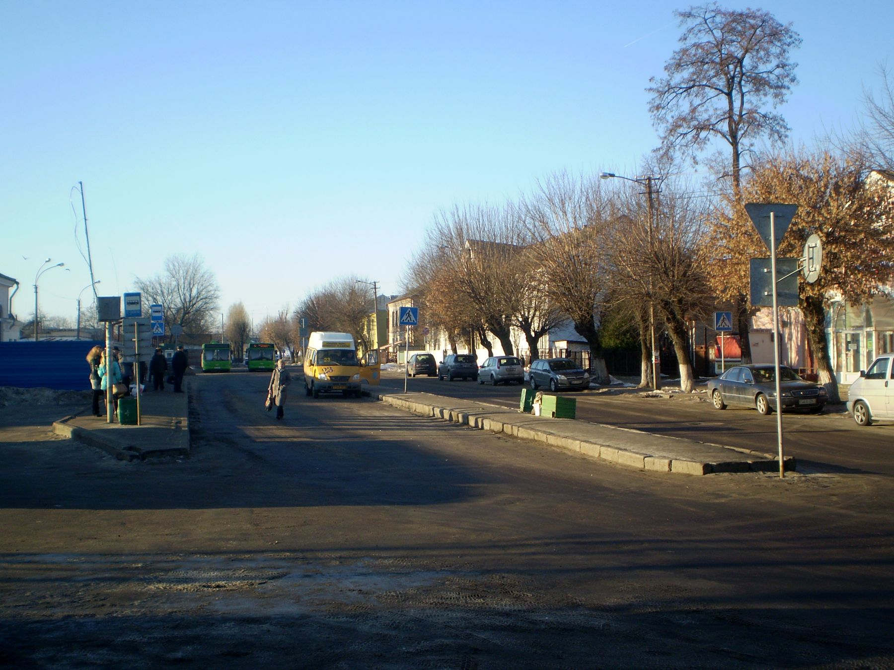 Прыпынак «Прыгарадны вакзал»